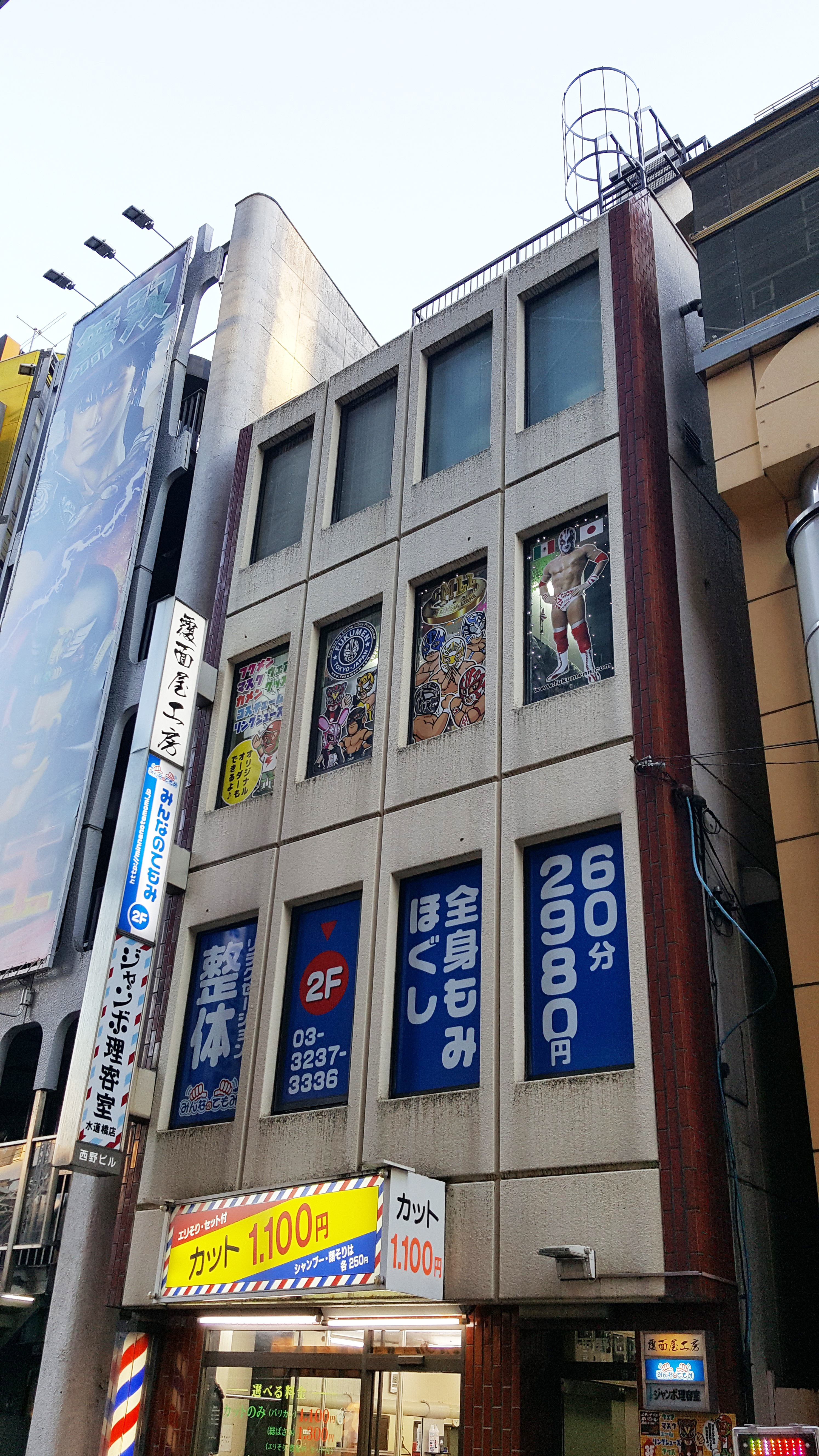 覆面屋工房・水道橋店